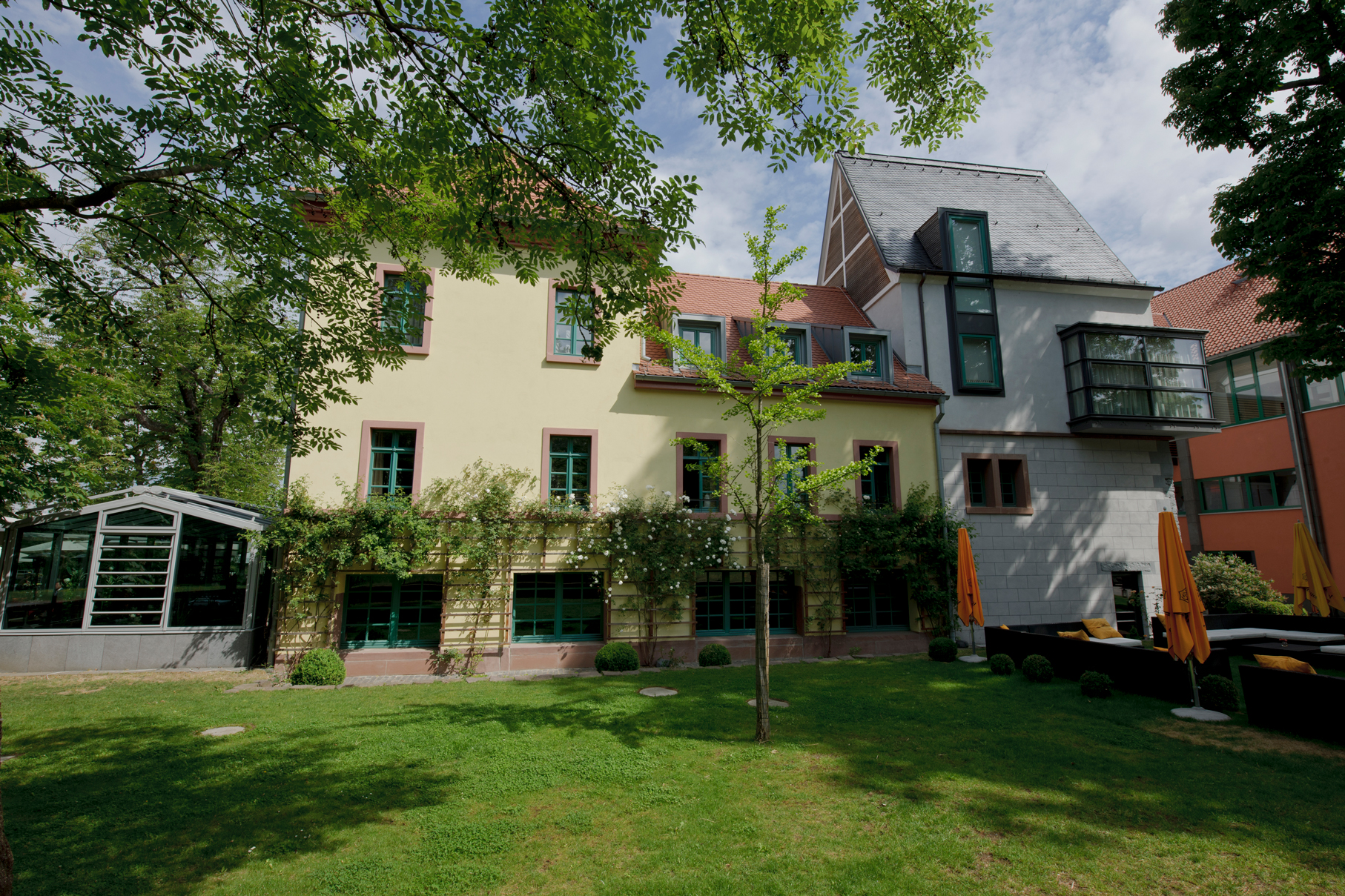 Restaurant und Hotel der Gerbermühle (2017), Ansicht von Süden.